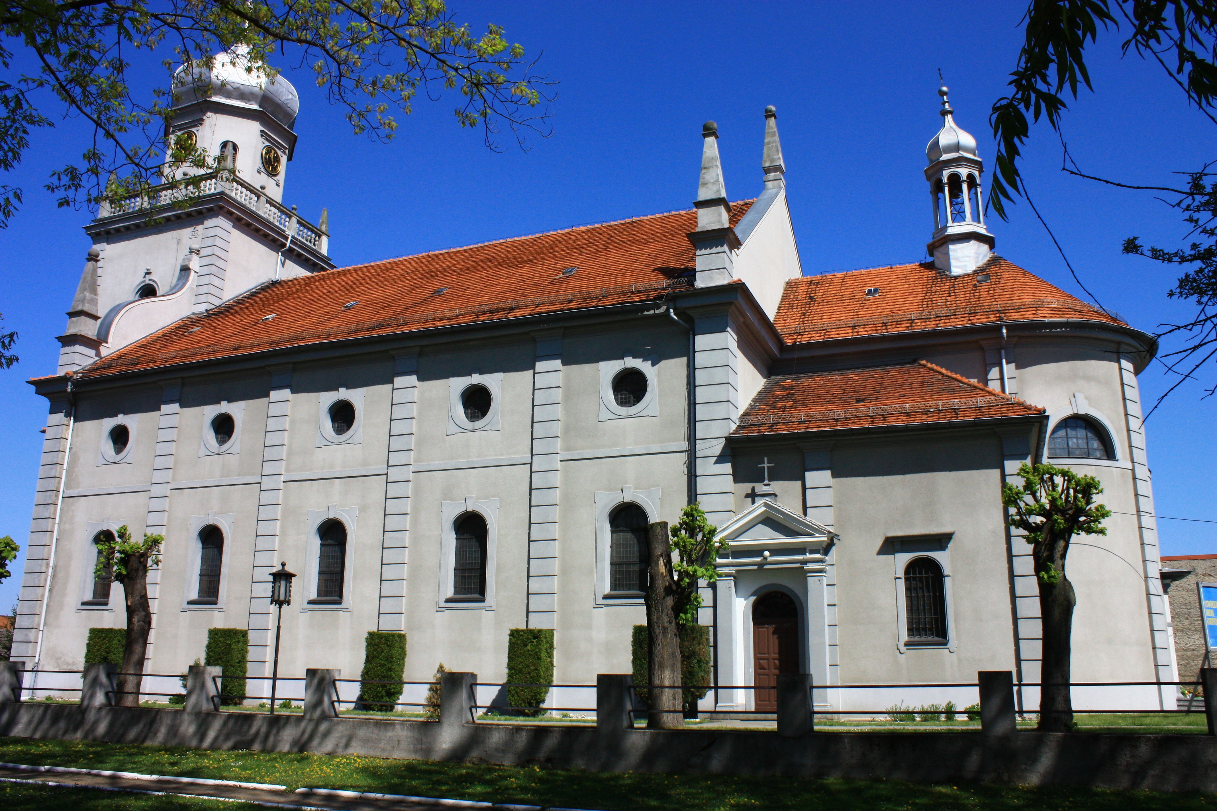 Sulmierzyce, kościół par. p.w. Wniebowzięcia NMP, 1878-1879